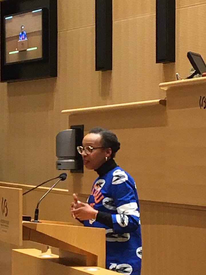 Joëlle Kapompole lors d'une séance plénière au Parlement de la Fédération Wallonie-Bruxelles